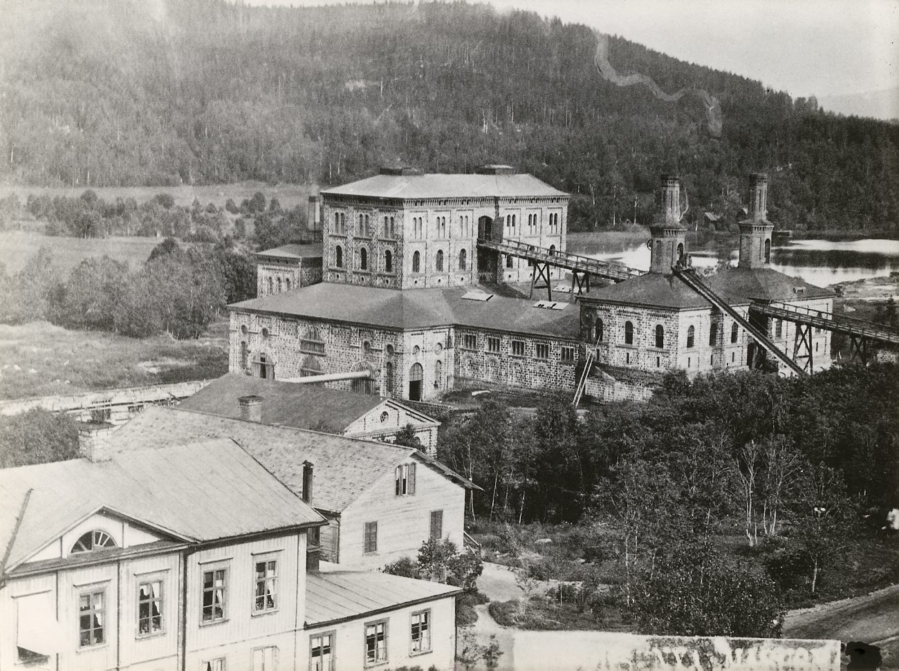 A349. Hofors "nya" masugn vid Hofors Järnbruk i Gästrikland.